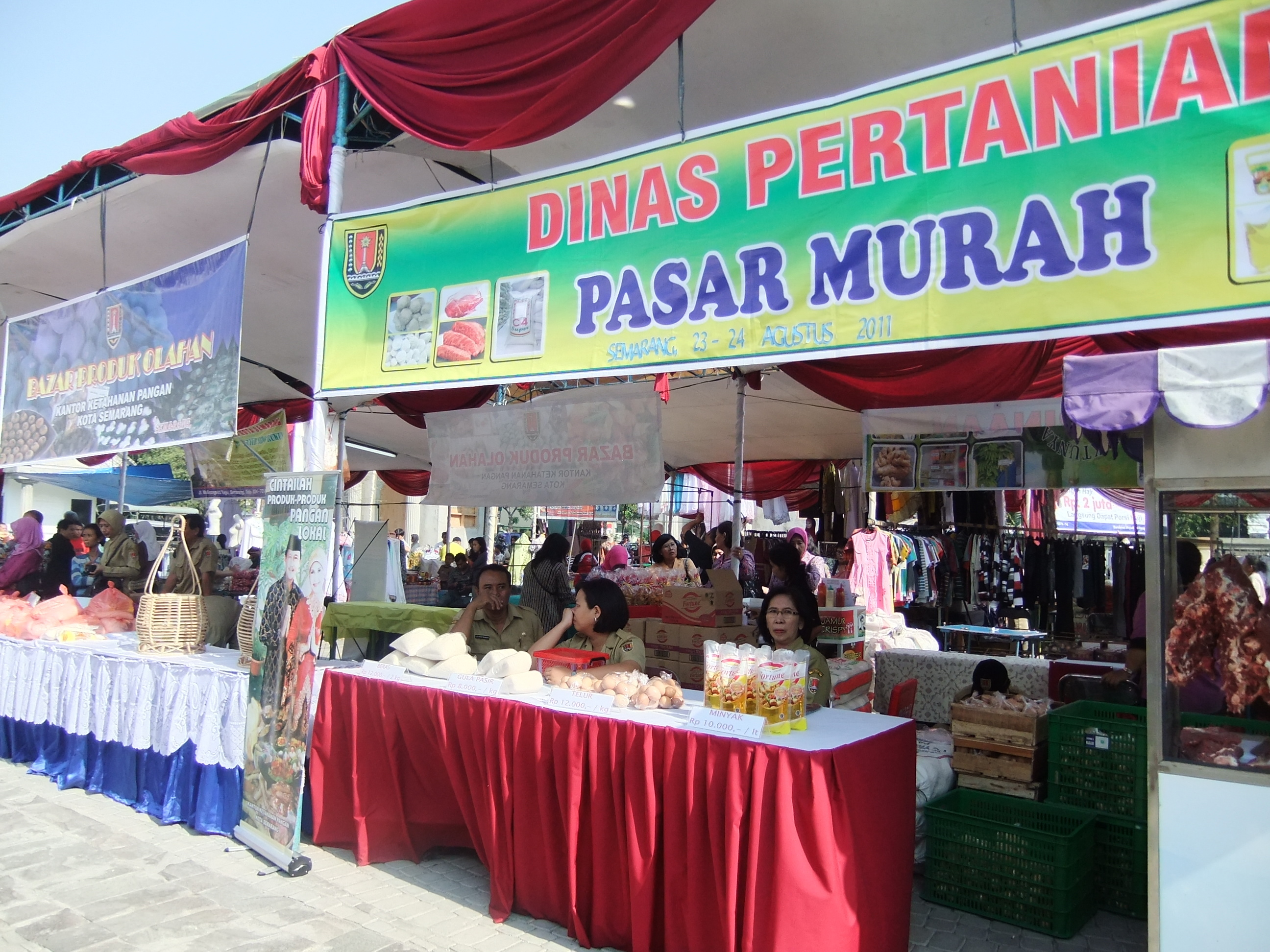 Sembako di Bazar Ramadhan di Balai Kota Semarang